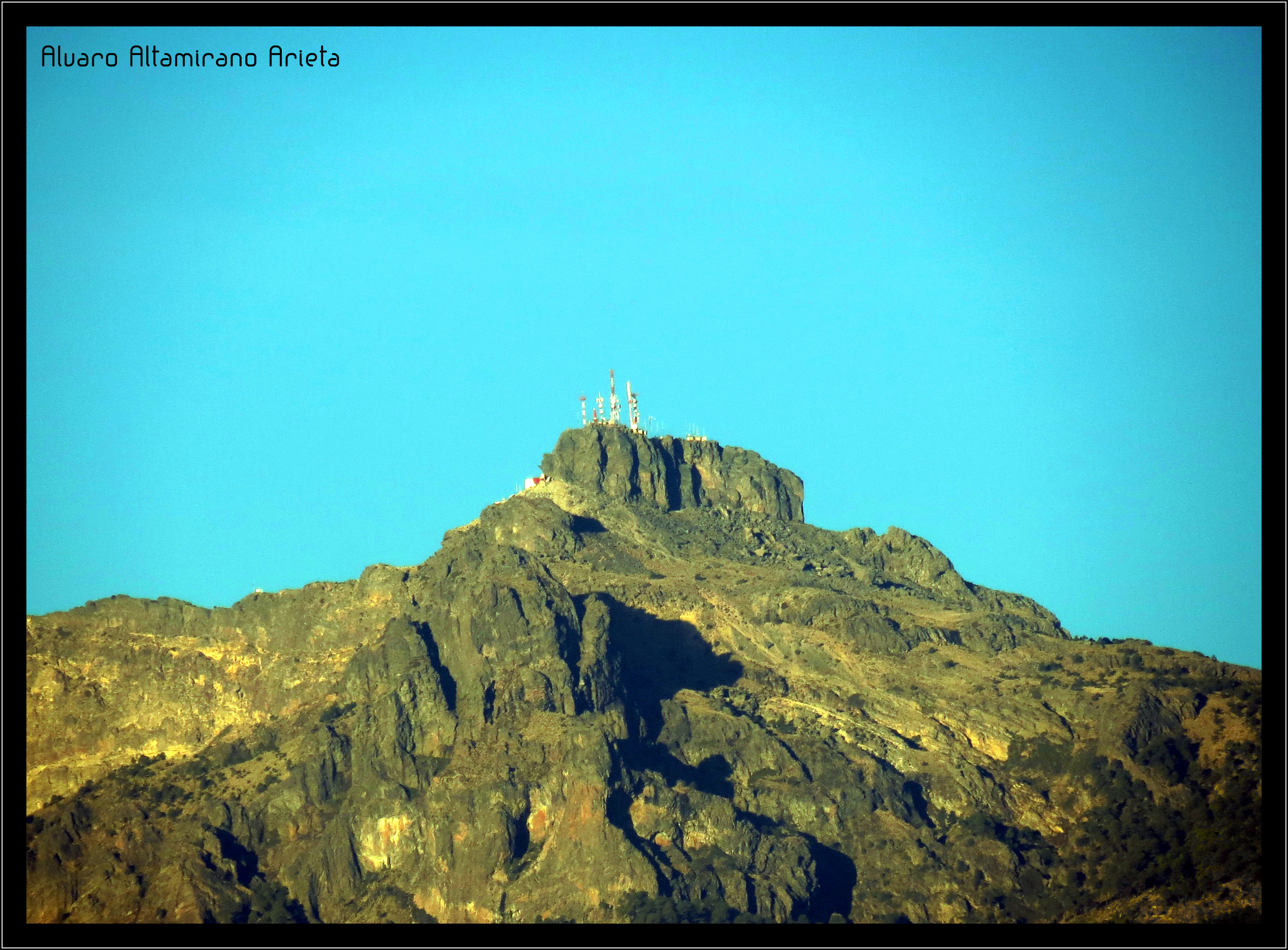 tomada a una altura de 1467msnm y a una distancia de 23790mts